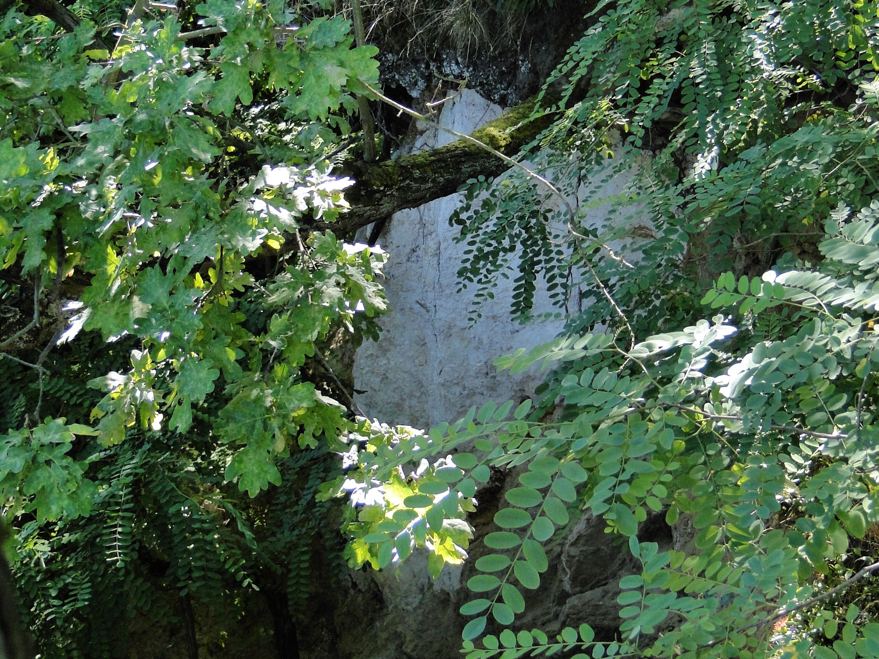 Porwak margla nad zachodnim brzegiem Jeziora Szmaragdowego